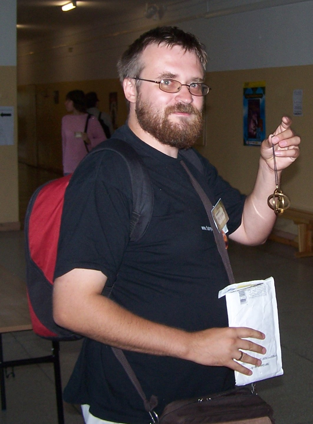 Andrzej Pilipiuk at Polcon 2006 in Lublin, Poland